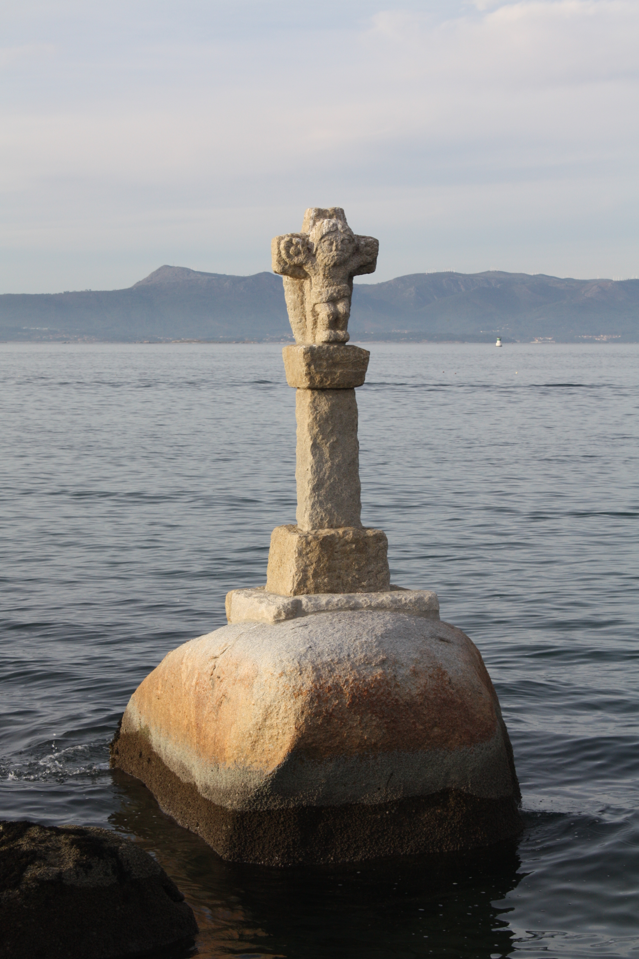 Cruceiro de Cantodorxo, no Grove, obra do escultor Francisco Pazos (2017)